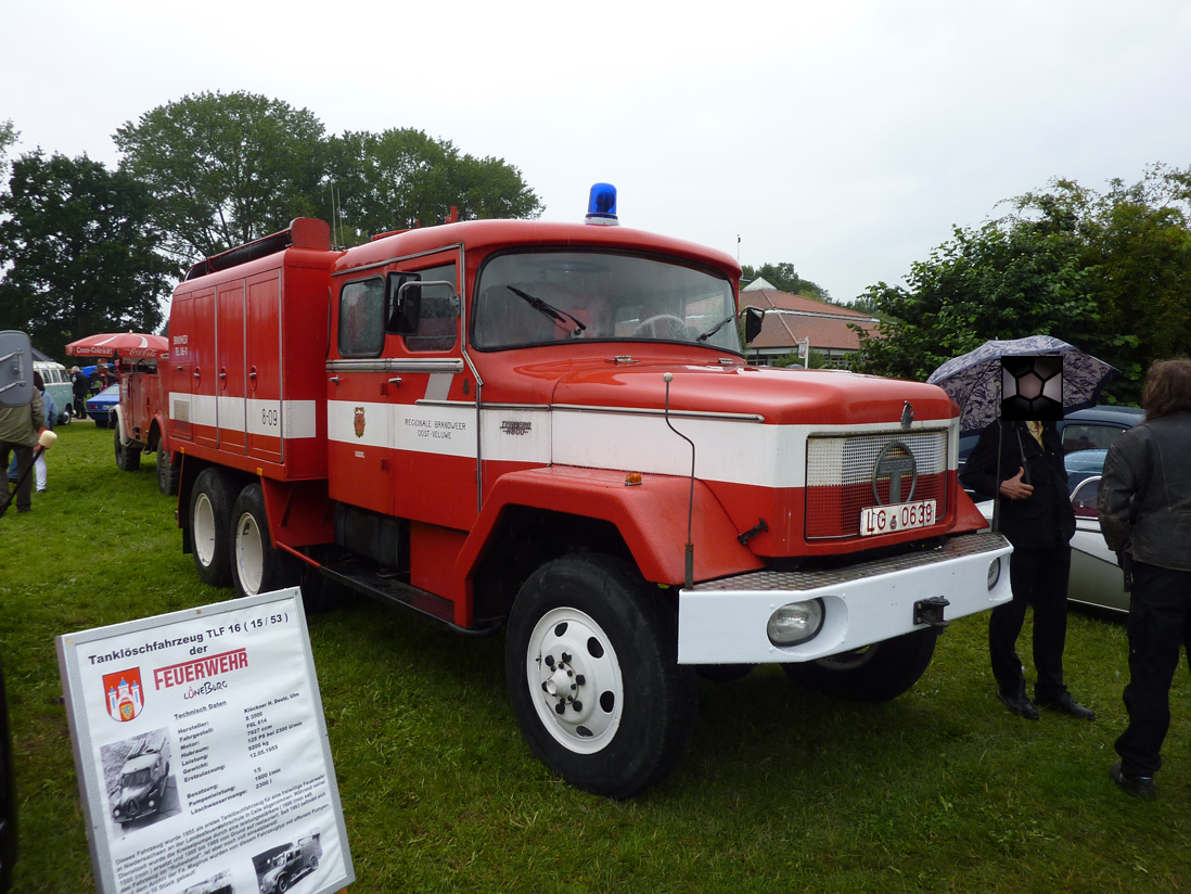 Een oude Brandweer "Terberg N800"